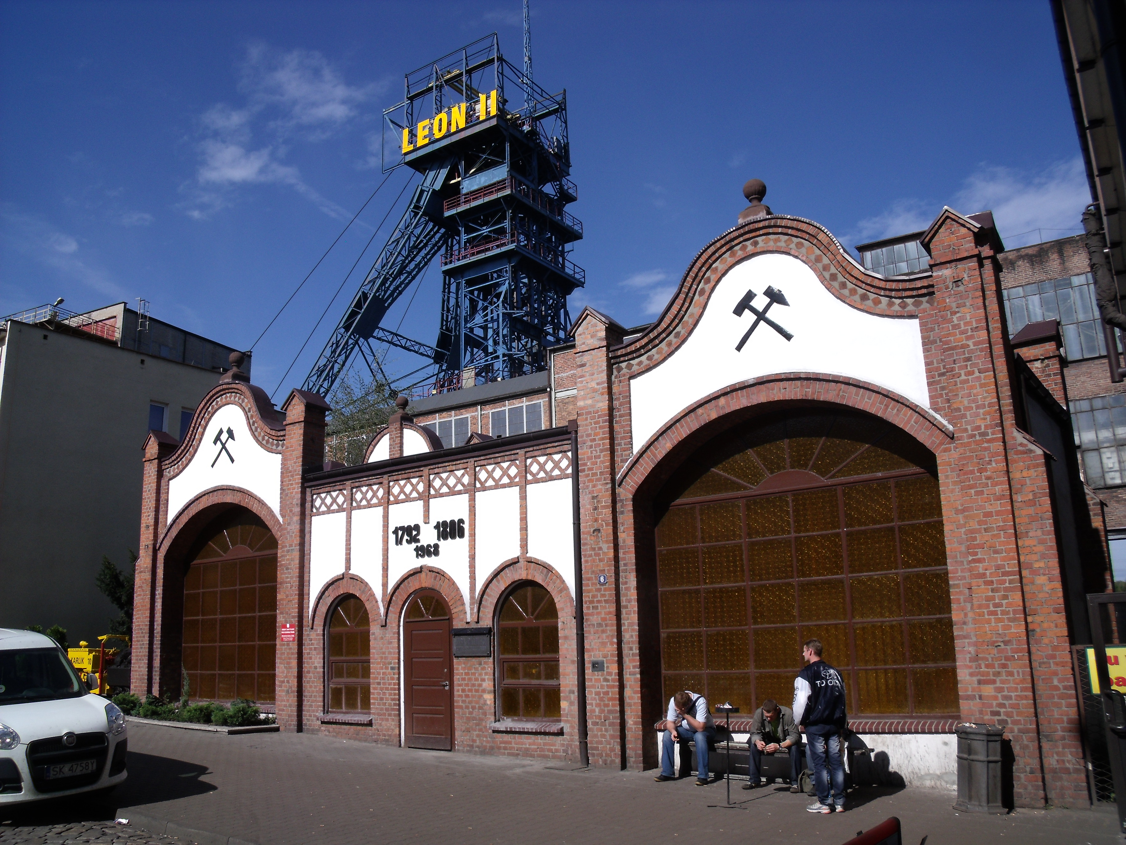 Budynek Wagi.